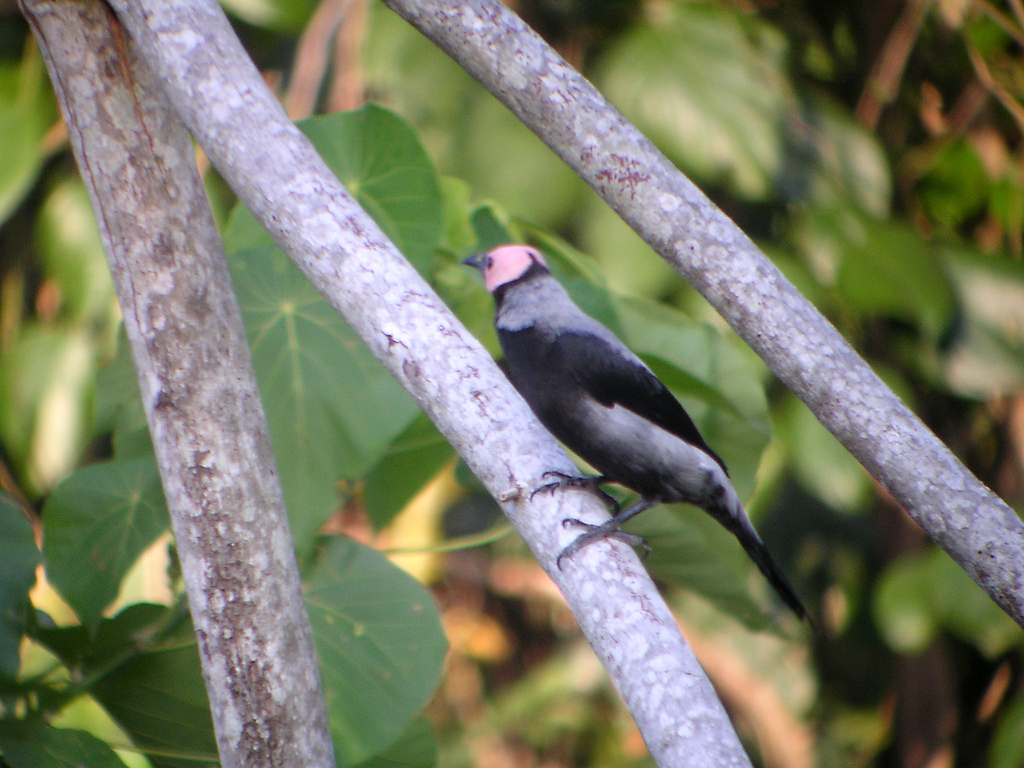 Coleto (Sarcops calvus) Subic Bay, Luzon